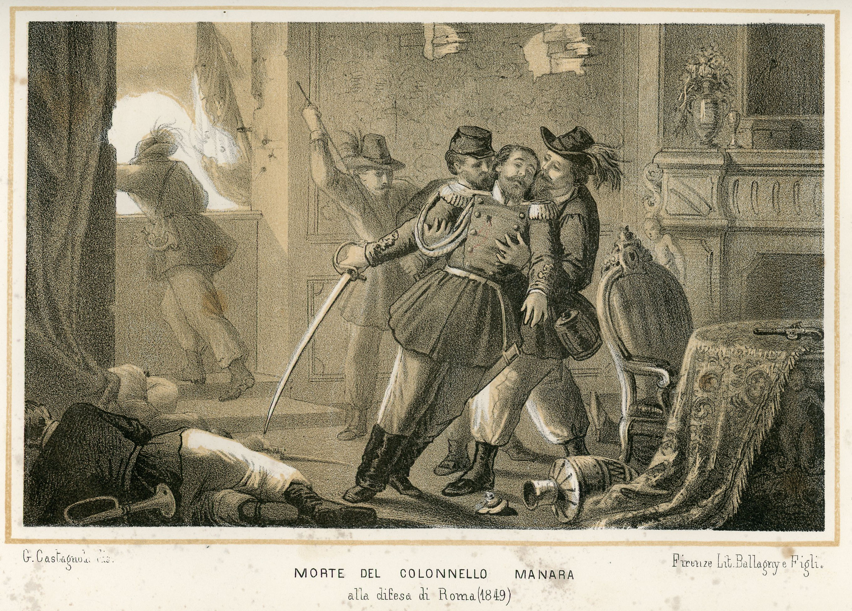 Morte del colonnello Manara (litografia).